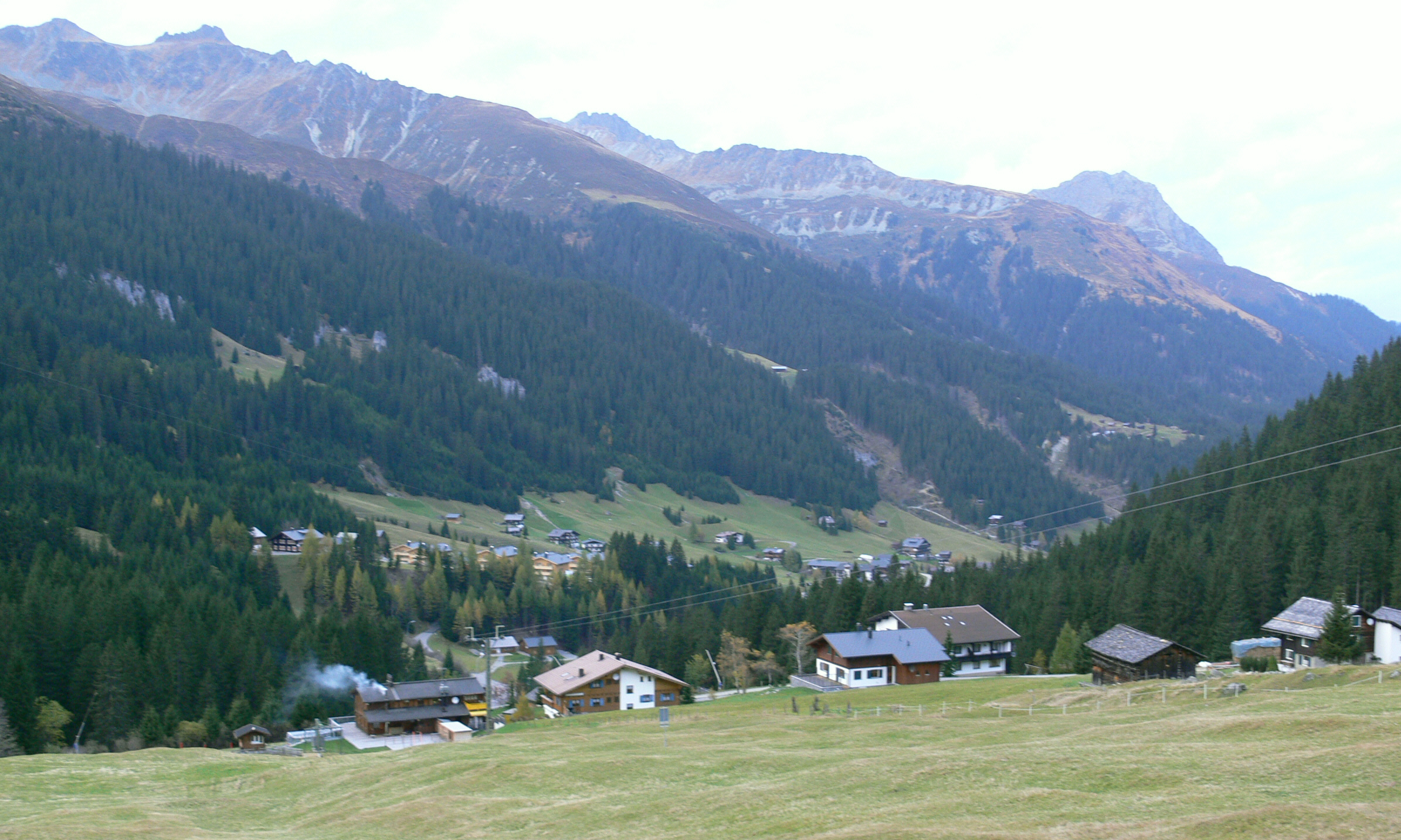 Landschaft bei Gargellen